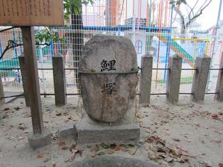 拝殿前に建つ鯉塚